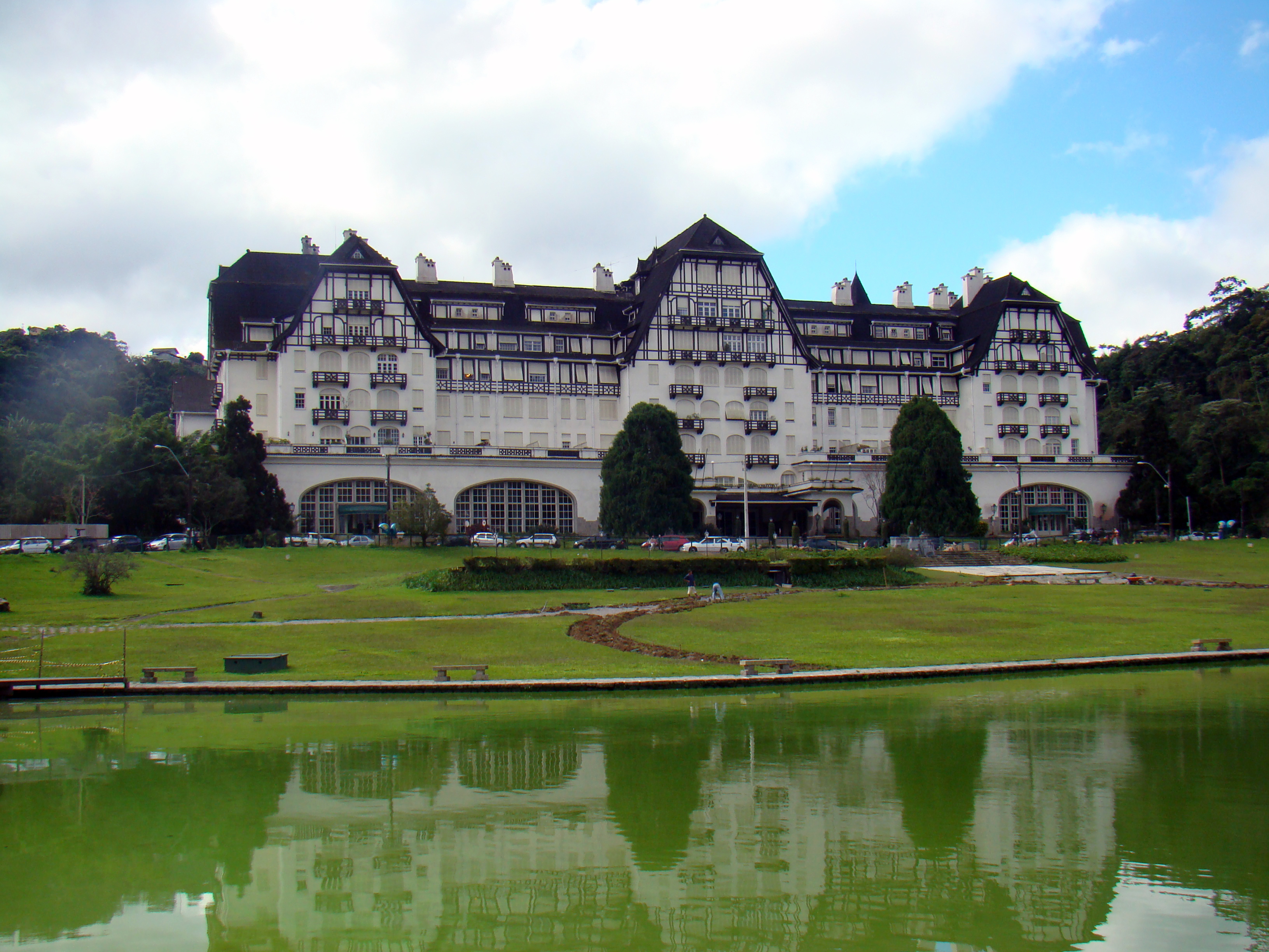 O Palácio Quitandinha é um palácio brasileiro. Está Localizado em Petrópolis.